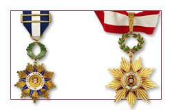 Ordem mérito comercial e industrial